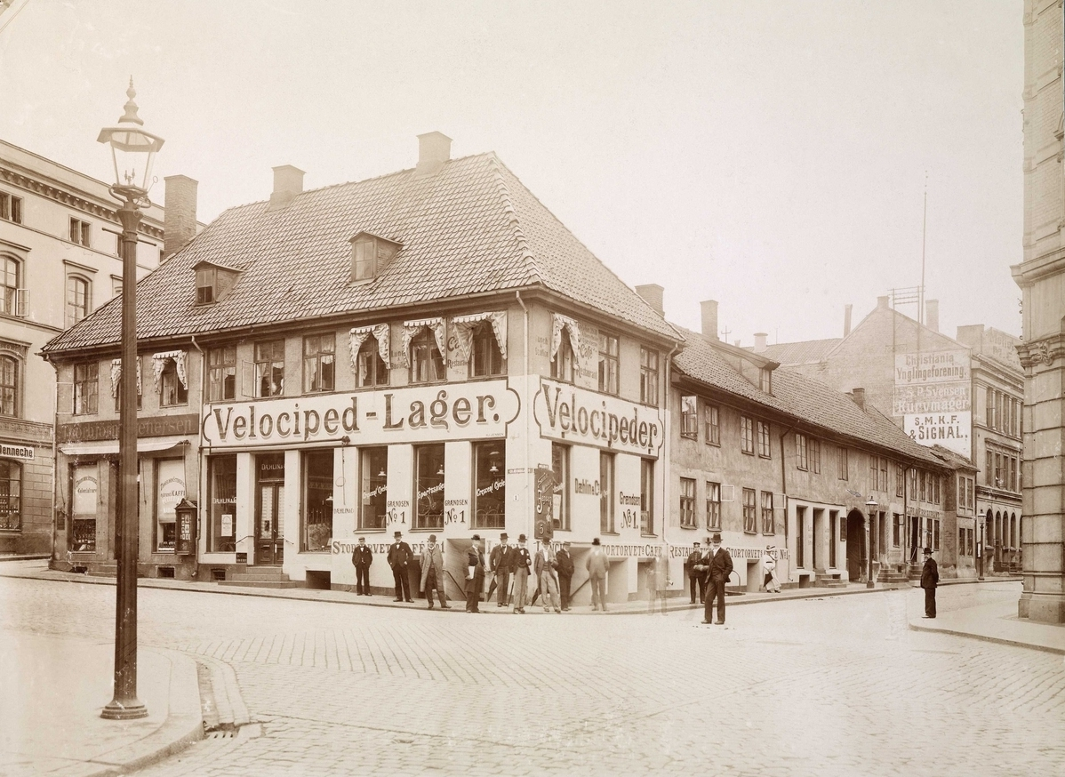 Grensen 1 med sykkelforretning i 1. etasje, Stortorvets Café og restaurant i underetasjen. 1890-tallet